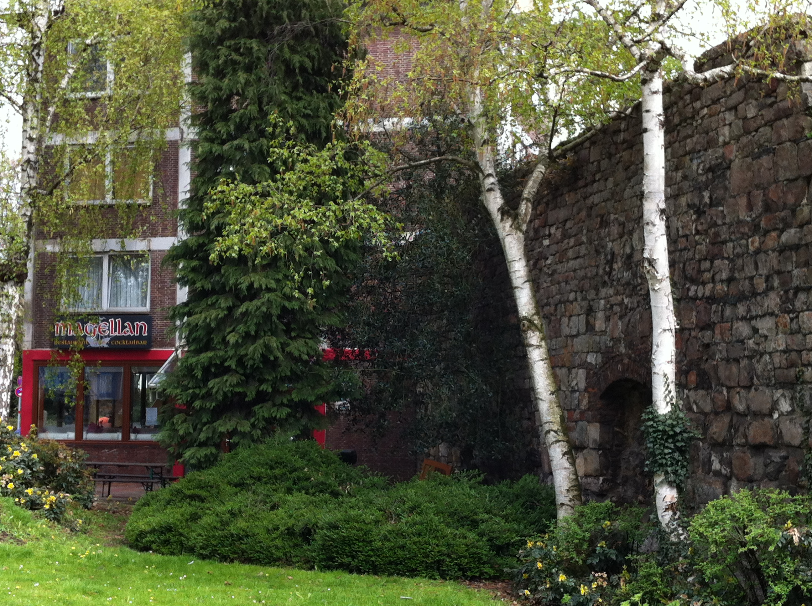 Die innere Stadtmauer von Aachen am Driescher Gäßchen; im Hintergrund das Restaurant Magellan. Die abschüssige Wiese markiert den ehemaligen Stadtgraben.